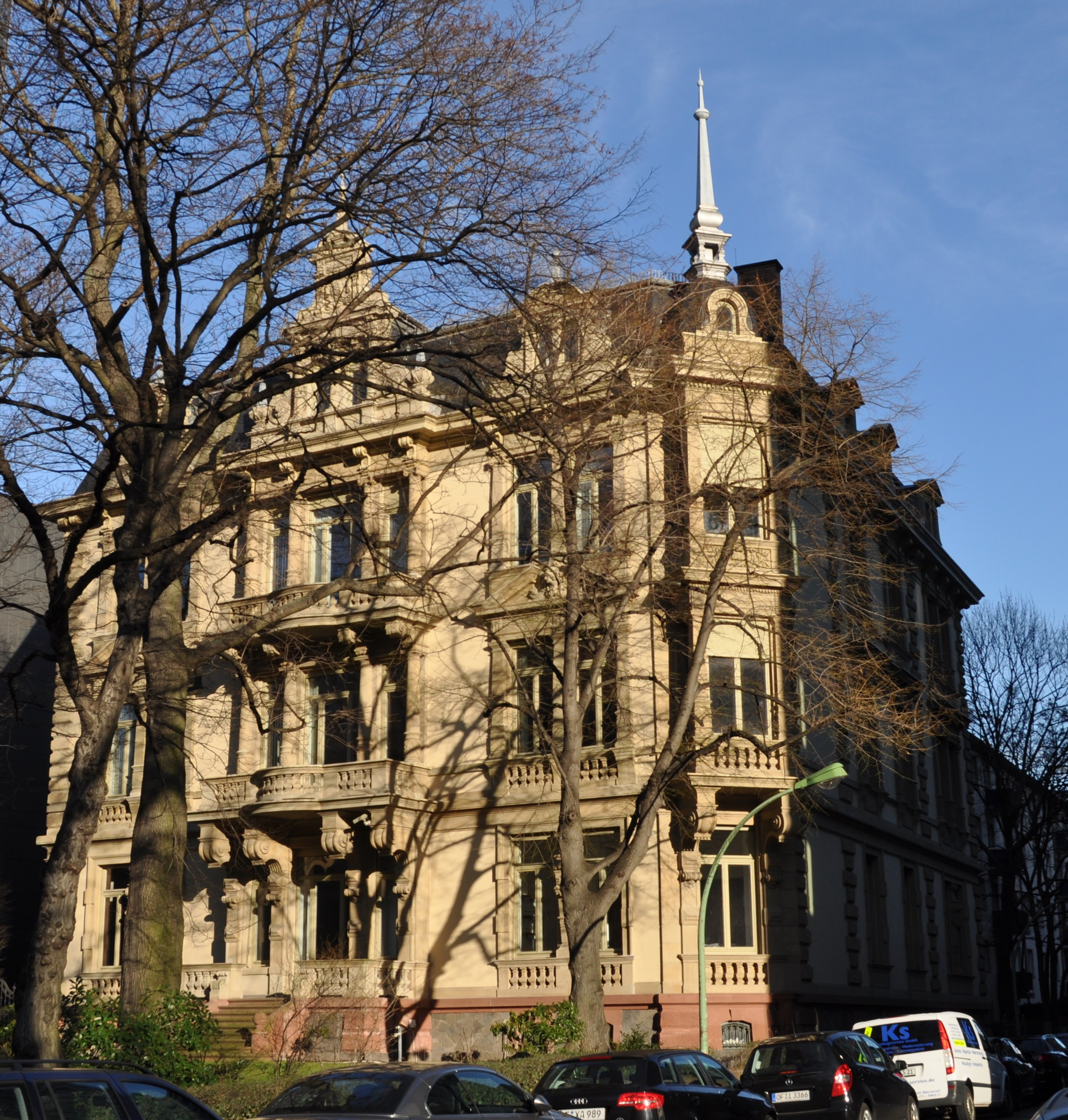 Denkmalgeschütztes Gebäude Unterlindau 1 in Frankfurt; Architekt Anton Eysen.